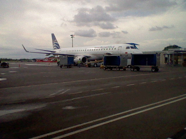 Embraer 190 de AeroRepública